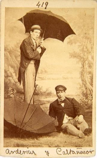 Francisco Arderius y Vicente Caltañazor en La isla de san Balandrán, fotografía de J. Laurent. Museo de Historia de Madrid